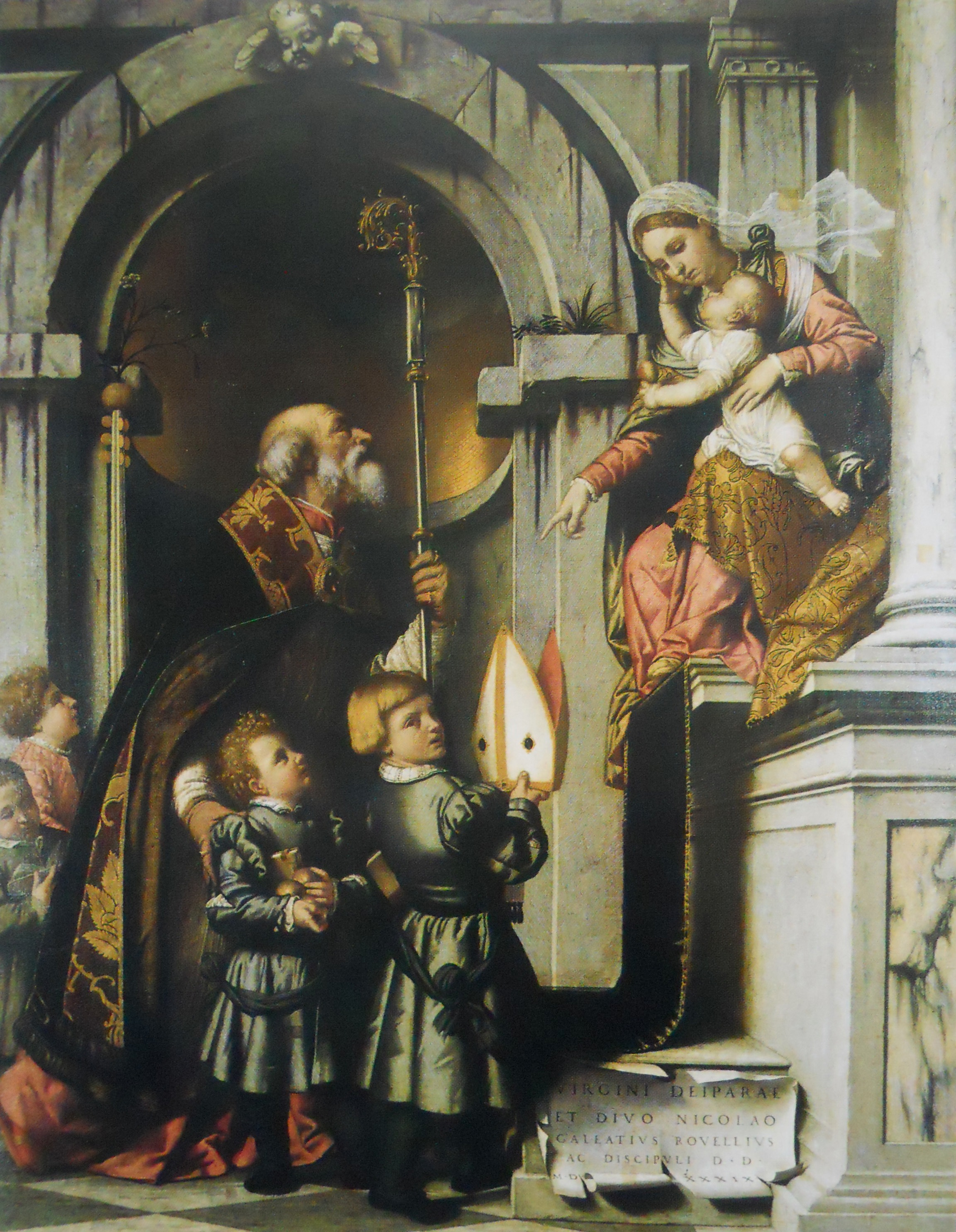 Moretto da Brescia, San Nicola di Bari presenta gli allievi di Galeazzo Rovelli alla Madonna in trono col Bambino (Pala Rovelli). Opera esposta nella Pinacoteca Tosio Martinengo a Brescia.